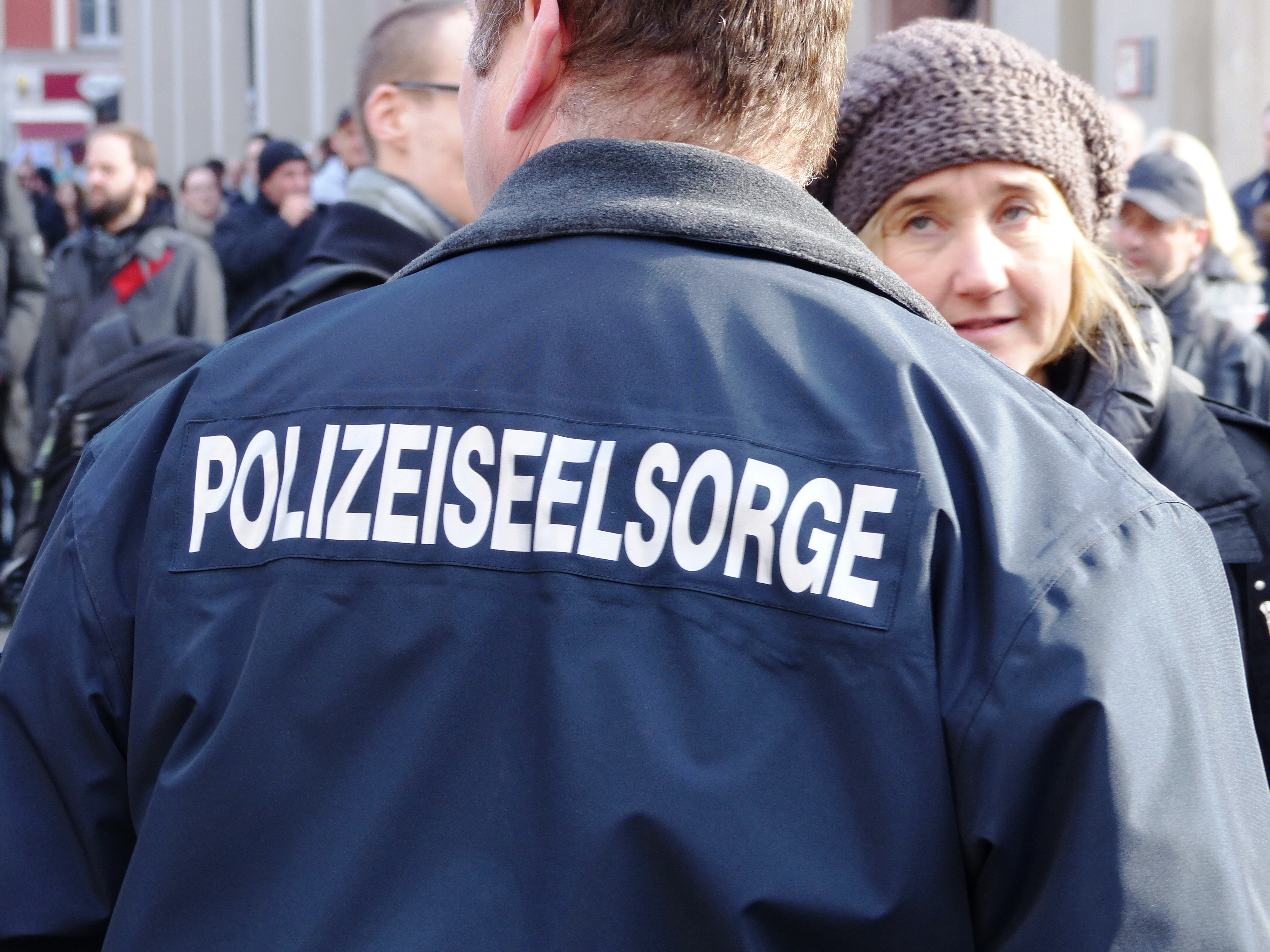 Demonstration gegen die Sichtheitskonferenz 2014 - München